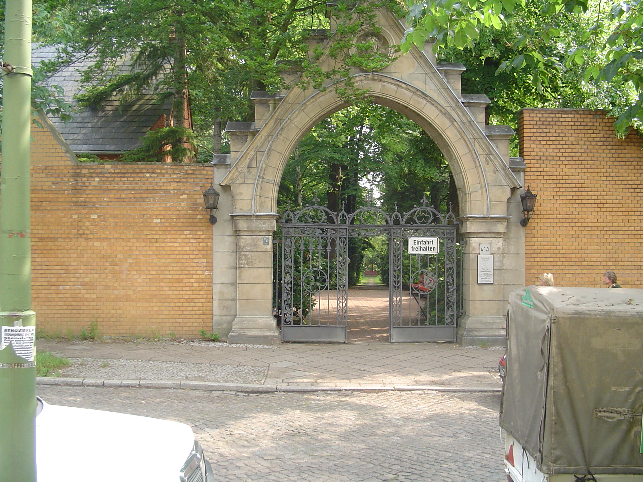 Berlin, Alter Friedhof Lichterfelde, Eingang Moltkestraße, Aufnahme von Westen